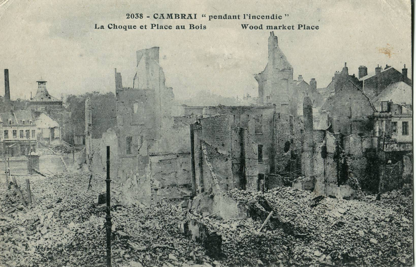 Carte postale ancienne éditée par Méresse, n°2038 : CAMBRAI pendant l'incendie - La Choque et Place au Bois